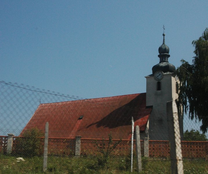 Osuské